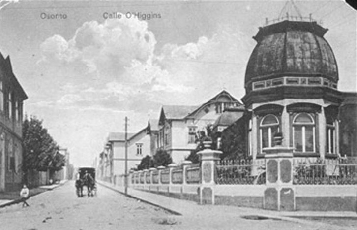 Calle O´Higgins, ciudad de Osorno, 1900.